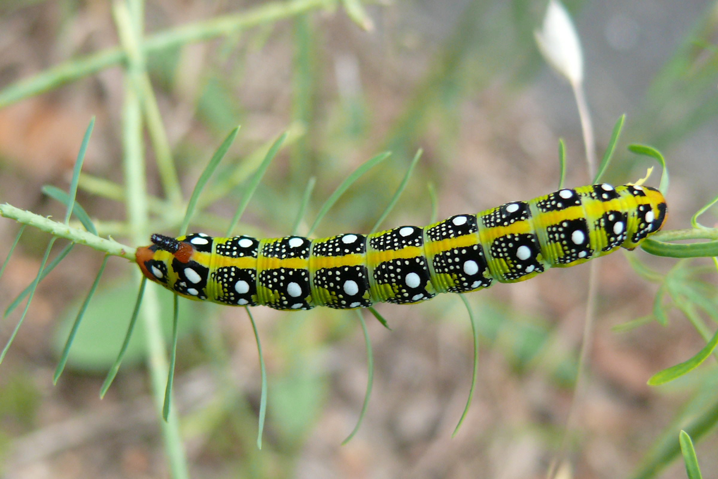 Raupe des Wolfsmilchschwärmers (Hyles euphorbiae)